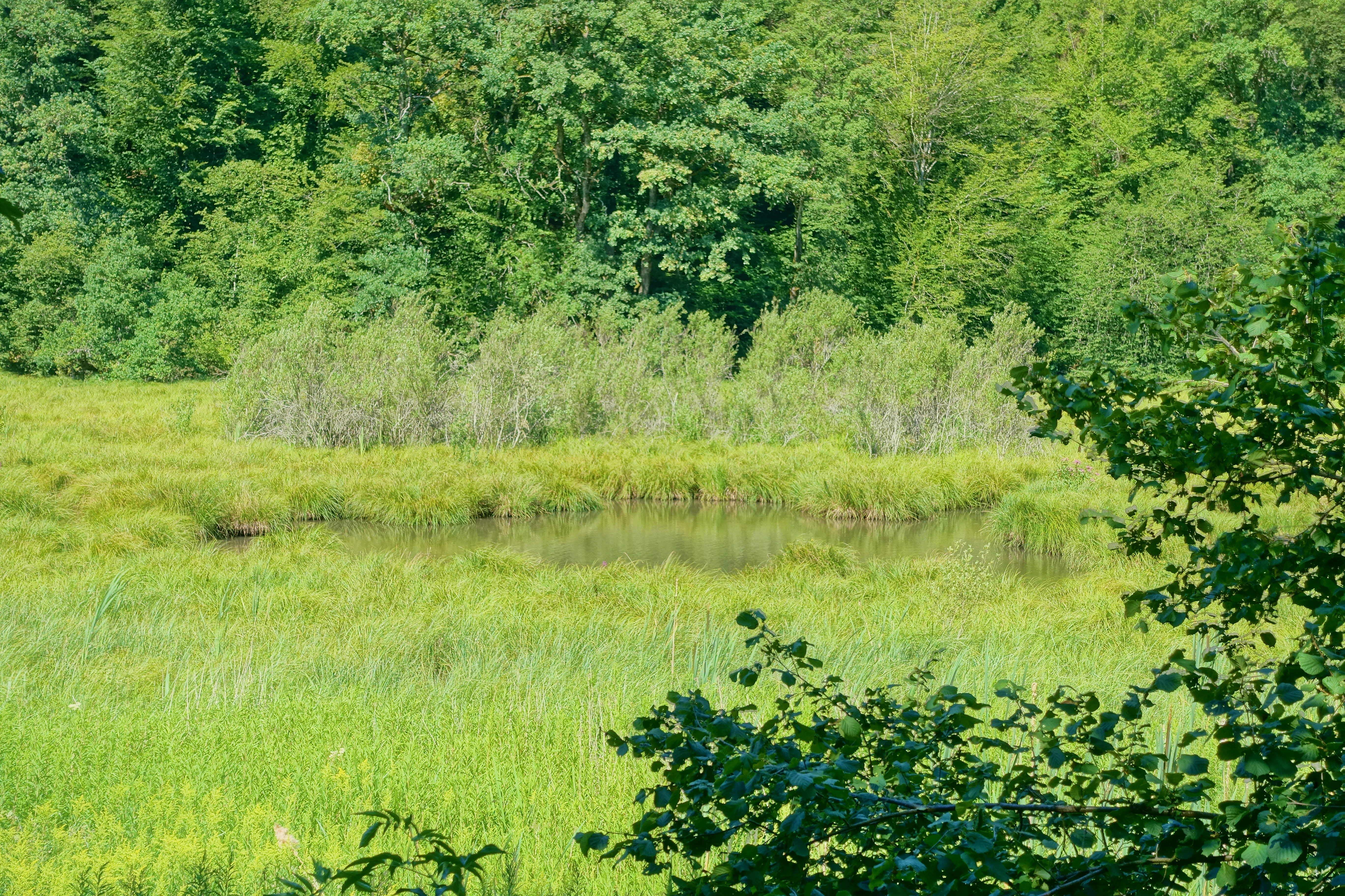 Naturschutzgebiet Kapellenhalde - Wüster See